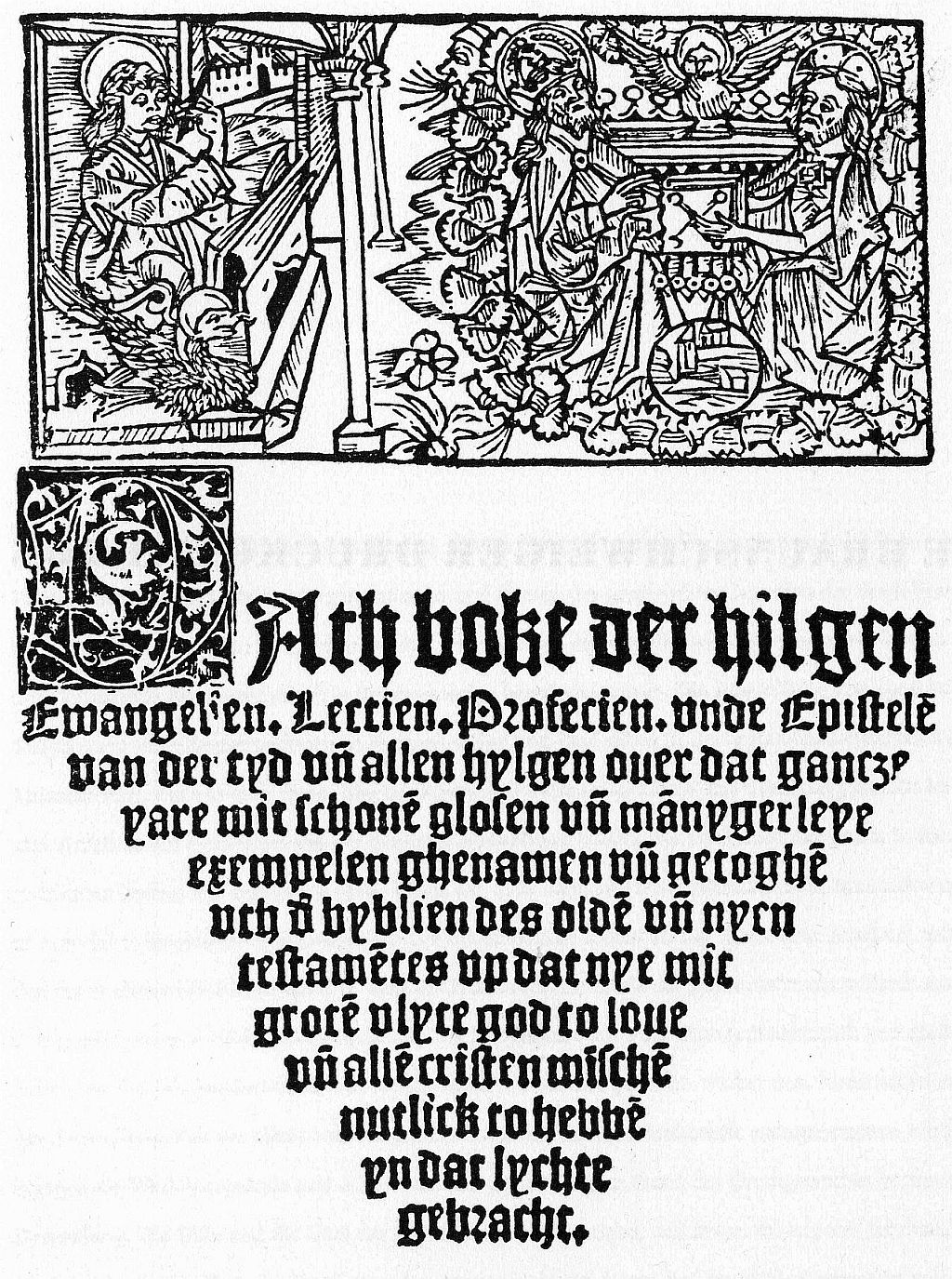 Titelblatt des Buches Dath boke der hilgen Ewangelien. Lectien. Profecien unde Epistelen … von Hans Dorn, Buchdrucker in Braunschweig, von 1506.